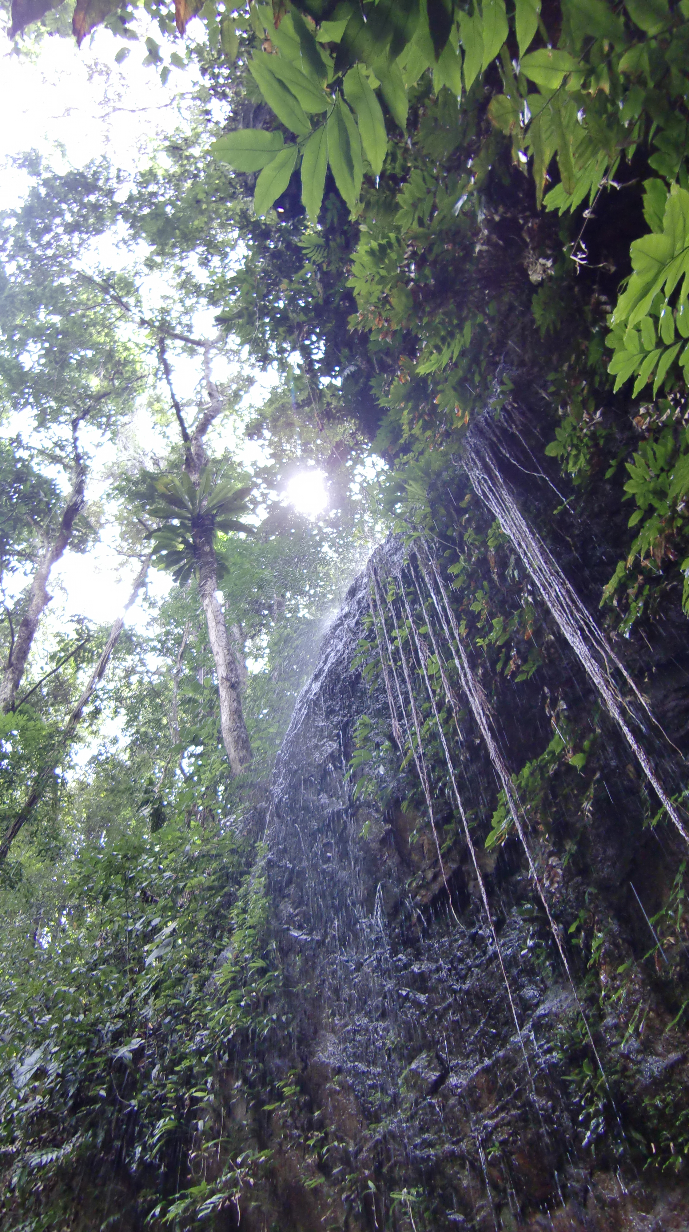 leo waterval